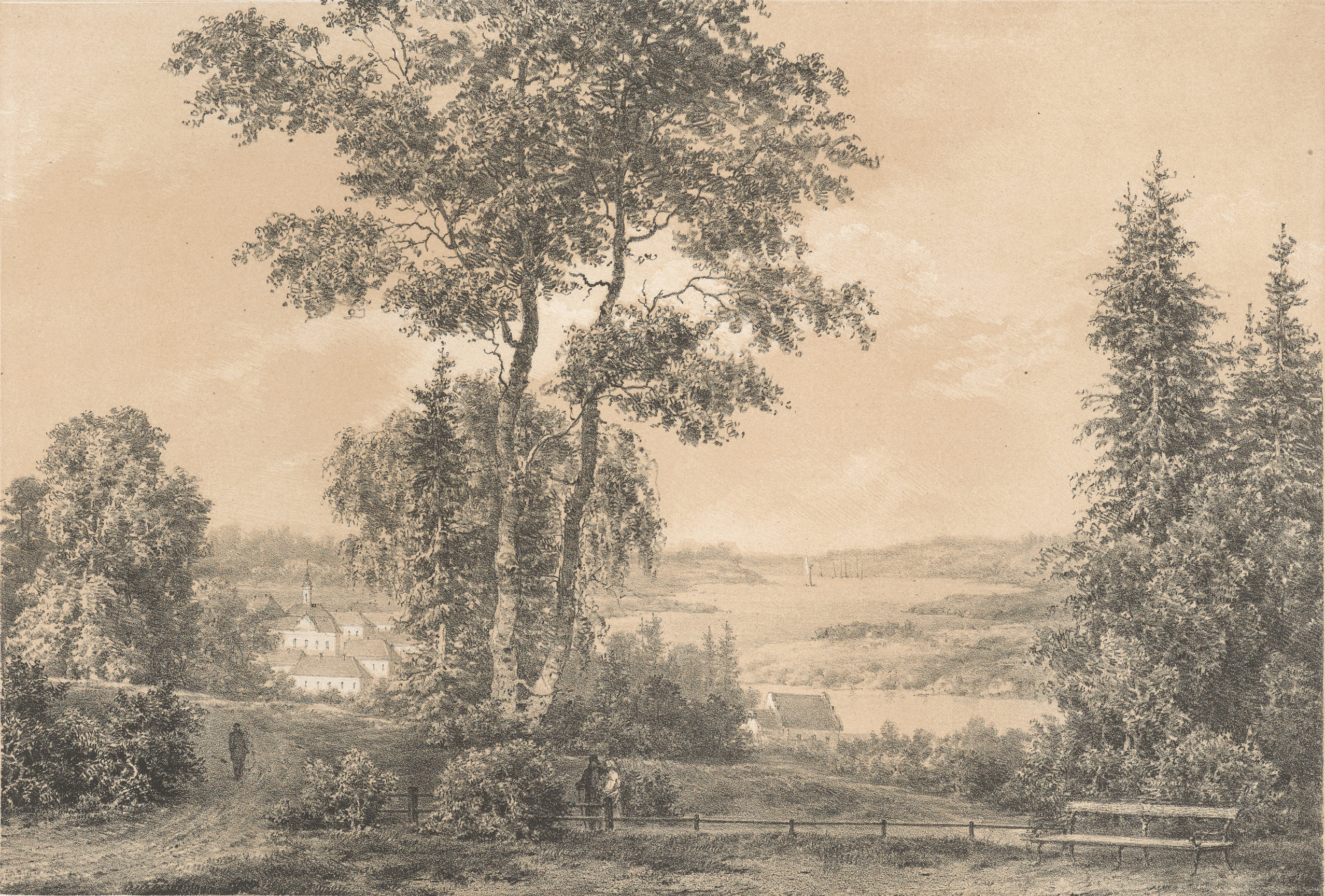 Беларуская (тарашкевіца): Краслаў (Krasłaŭ)